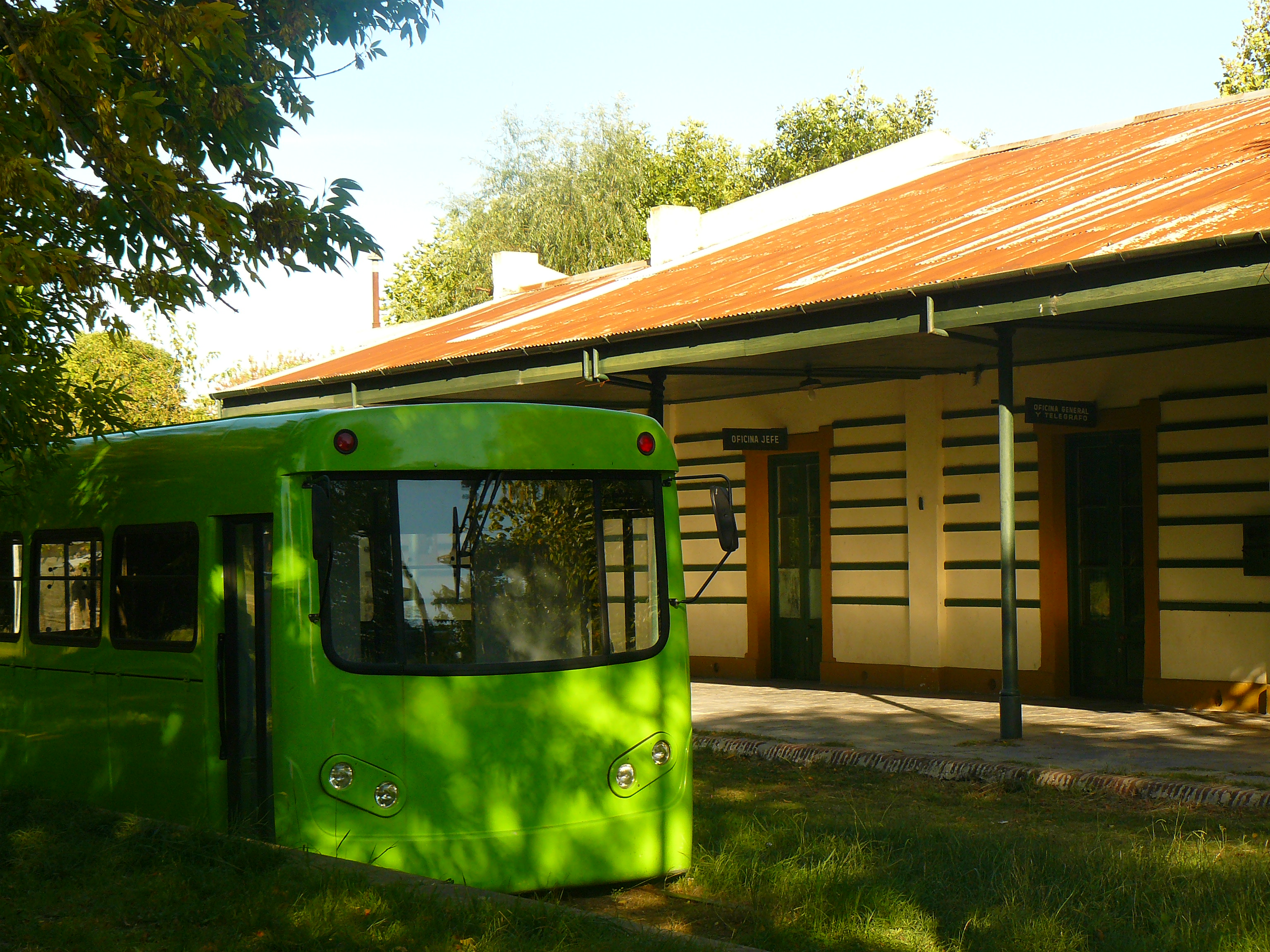 Conjunto Arquitectónico estación del FFCC